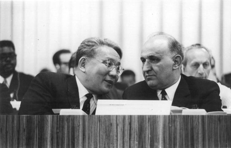 ADN-ZB Kollektiv 15-6-71-ba Berlin: VIII. Parteitag der SED-In der Berliner Werner-Seelenbinder-Halle begann heute (15.6.) der VIII. Parteitag der SED. Unser Foto zeigt im Präsidium den Ersten Sekretär des ZK der BKP, Todor Shiwkow, Vorsitzender des Ministerrates der VRB (r), und den Ersten Sekretär des ZK der MRVP, Jumshagin Zedenbal, Vorsitzender des Ministerrates der MVR. (Rep.: Koard)